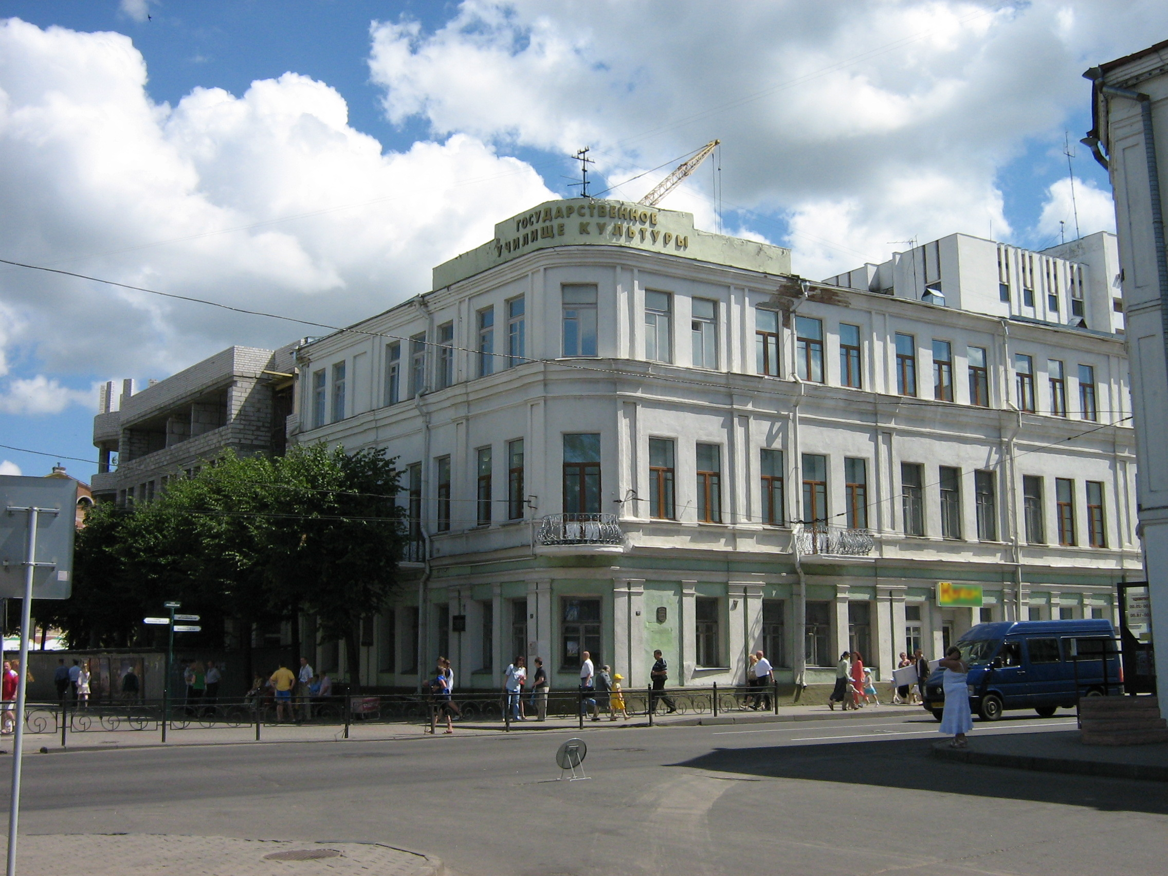 Могилев. Училище культуры.